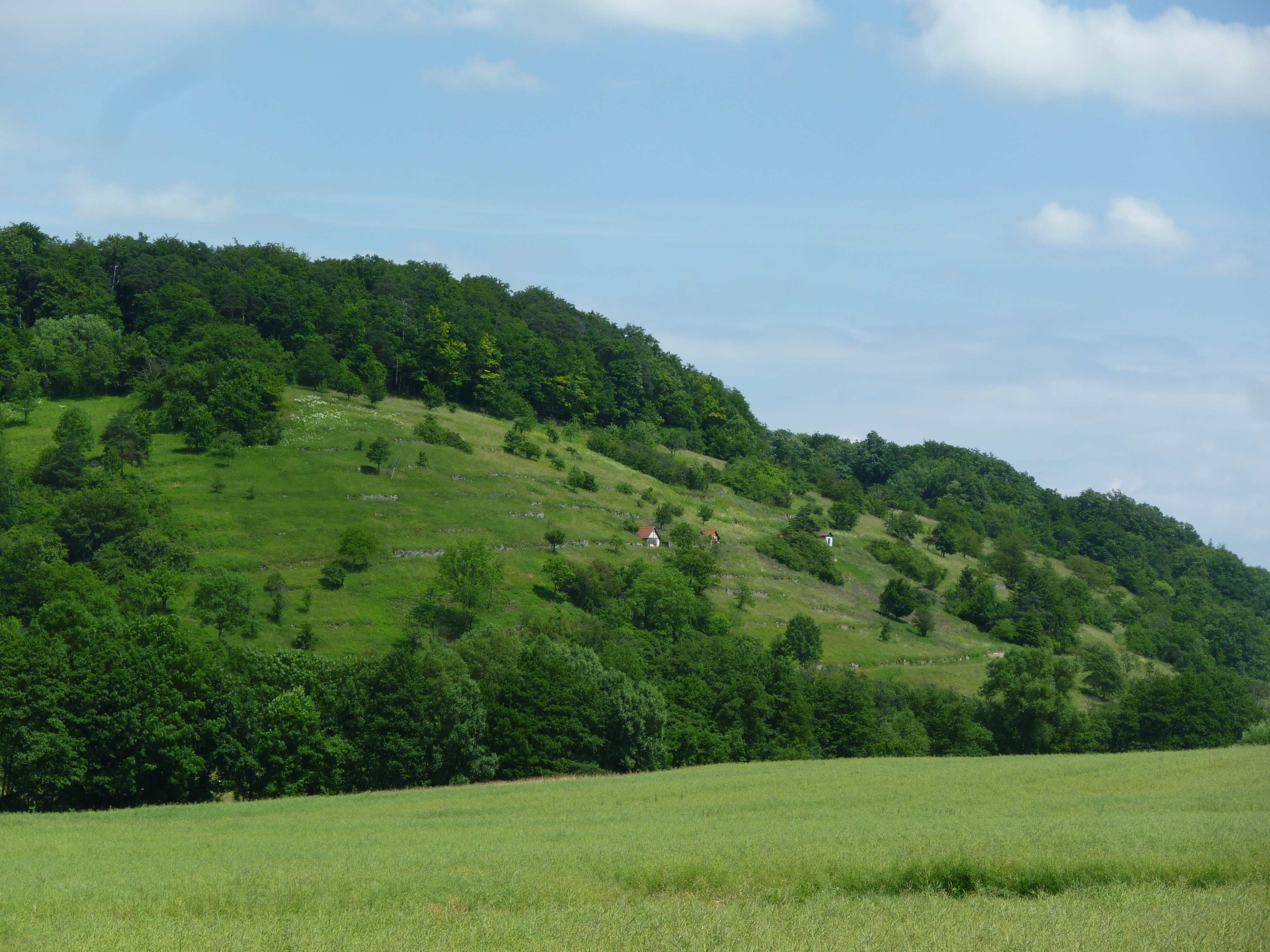 Weinbergbrache "Unterer Berg"